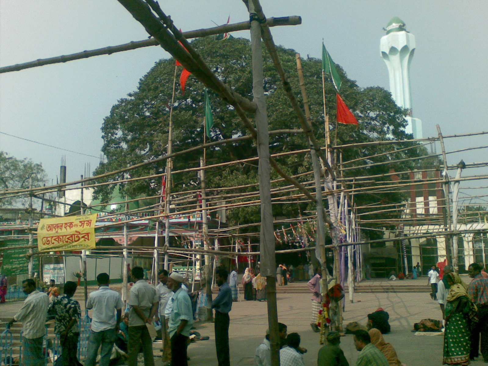 Shah Ali Mazar, Mirpur, Dhaka, Bangladesh.